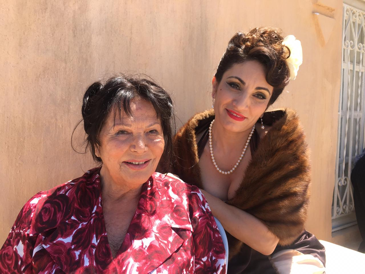 Claudia Cardinale e Paola Lavini sul set del film tunisino L'Isola del Perdono di Ridha Behi.